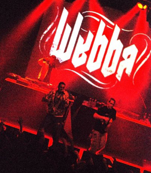 Webba bei einem Konzert 2009 im Bierhübeli Bern, Schweiz